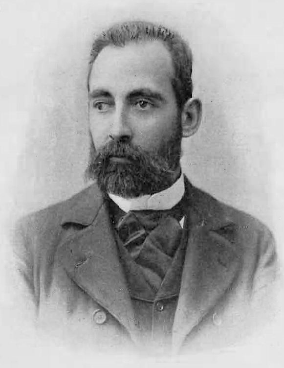 Foto del poeta y periodista chileno Pedro Antonio González (1863-1903) tomada en 1899.